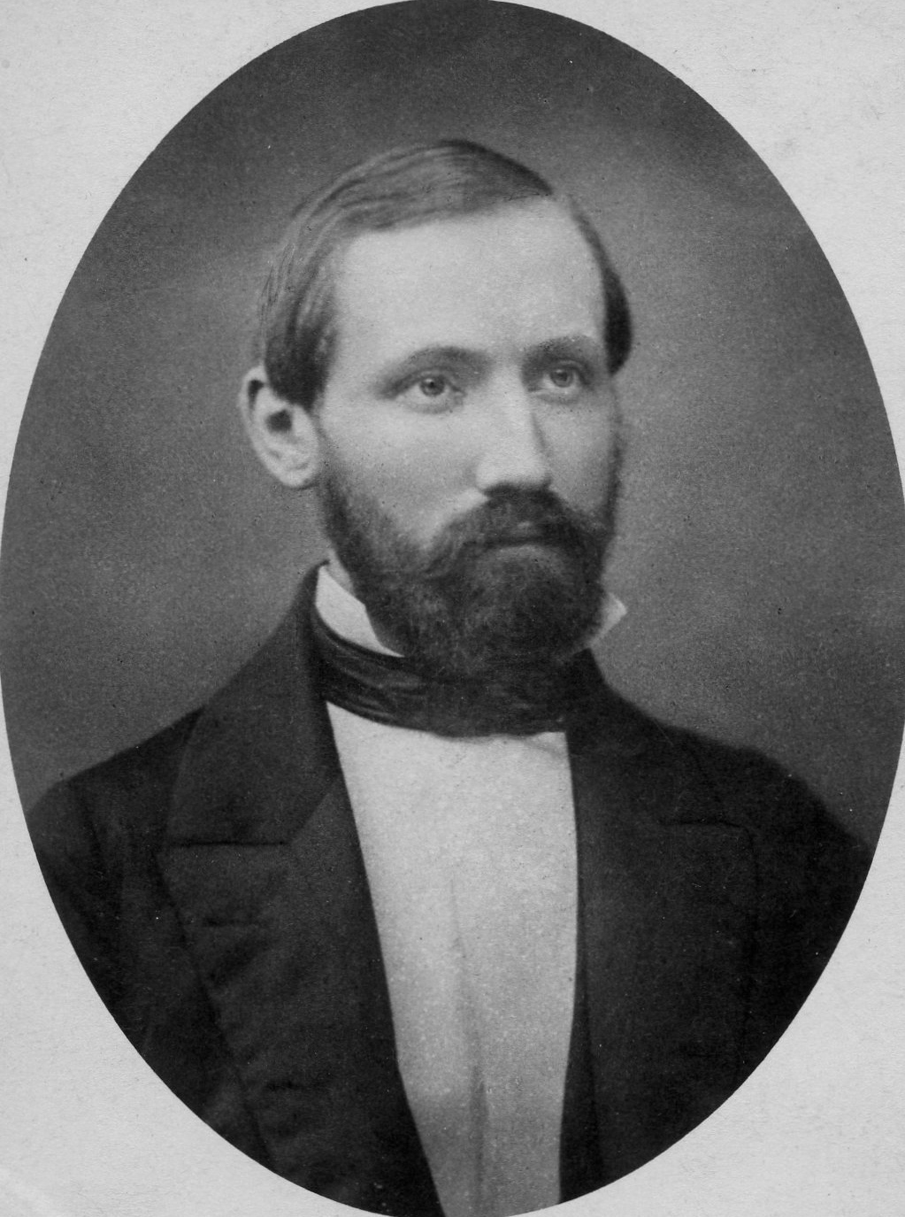 Bernhard Riemann (1826–1866), deutscher Mathematiker